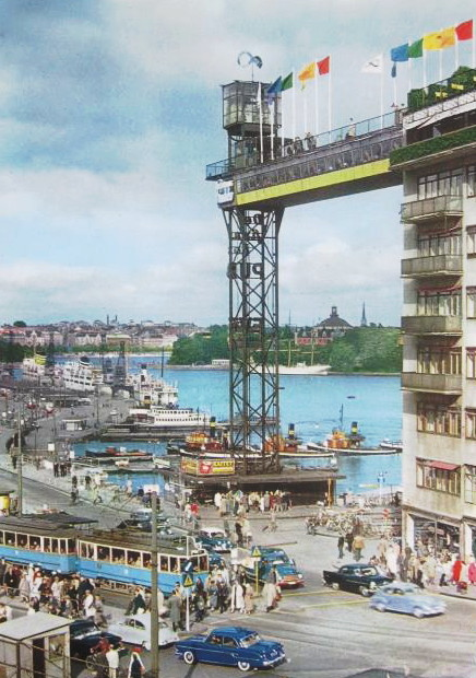 Katarinahissen i Stockholm